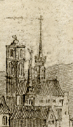 Église_de_l'abbaye_st_Martin_Troyes avecses deux clochers, tour et sur la croisée des transepts.